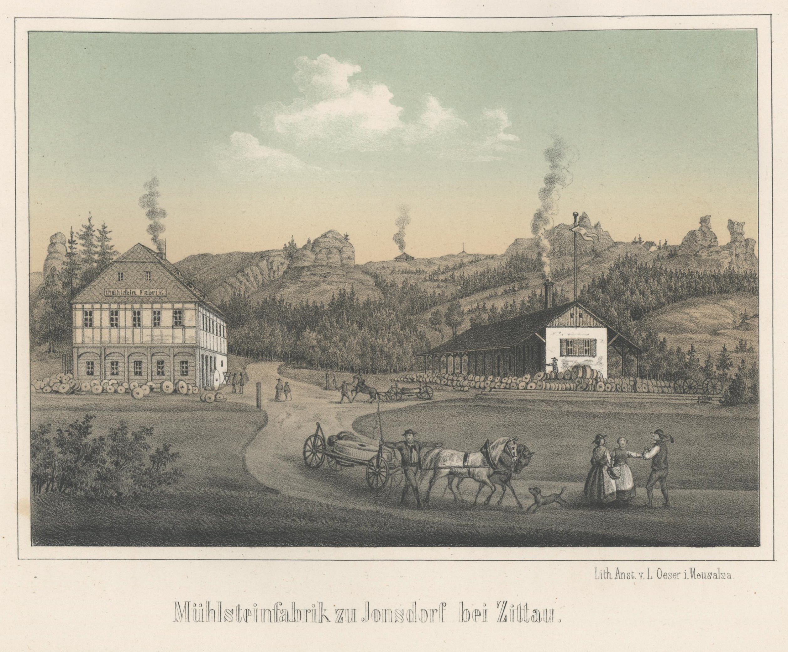 Mühlsteinfabrik zu Jonsdorf bei Zittau aus: Album der Sächsischen Industrie Zweiter Band